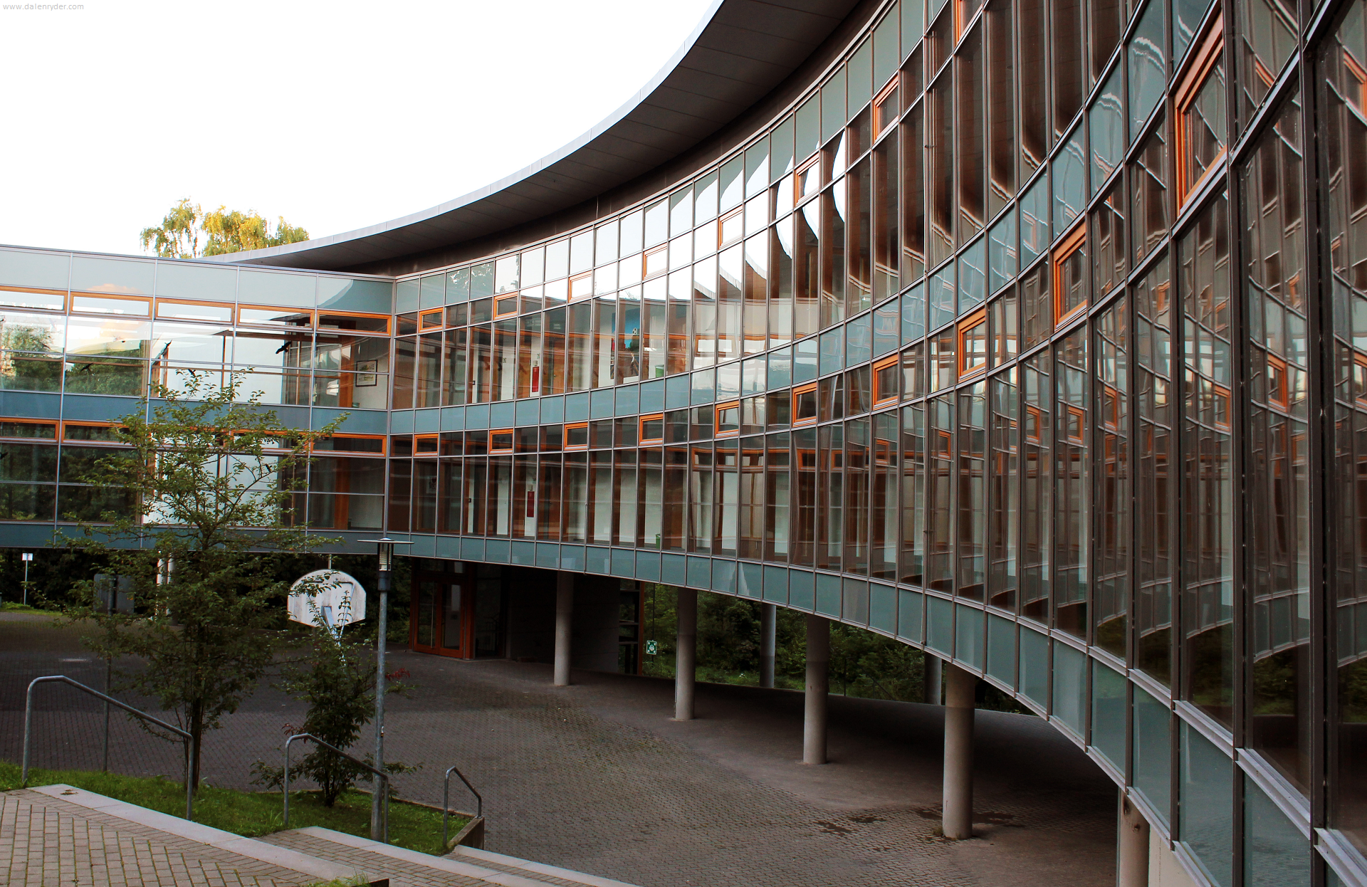 Städtisches Gymnasium Wermelskirchen Schulhof und Oberstufentrakt.